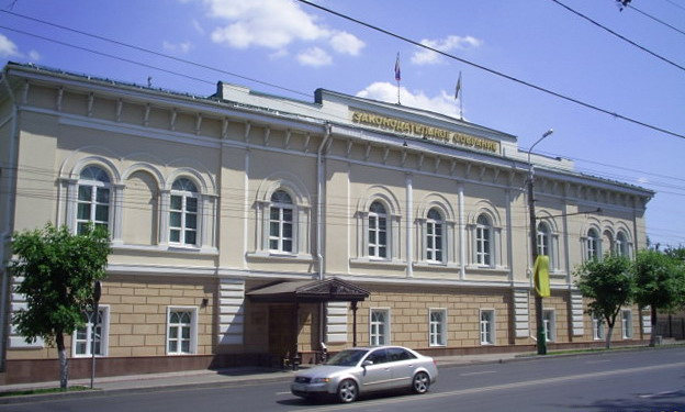 Здание Законодательного Собрания Пензенской области. г. Пенза, ул. Кирова, 13